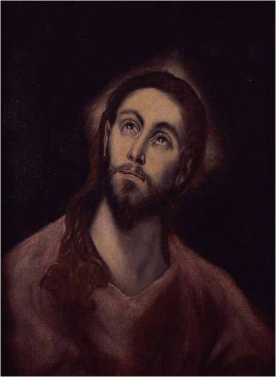 La obra representa a Jesucristo como salvador del mundo.